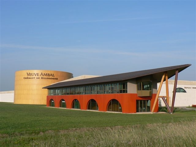 VEUVE AMBAL, le site de production de Montagny Les Beaune,visite guidée, degustation, Boutique